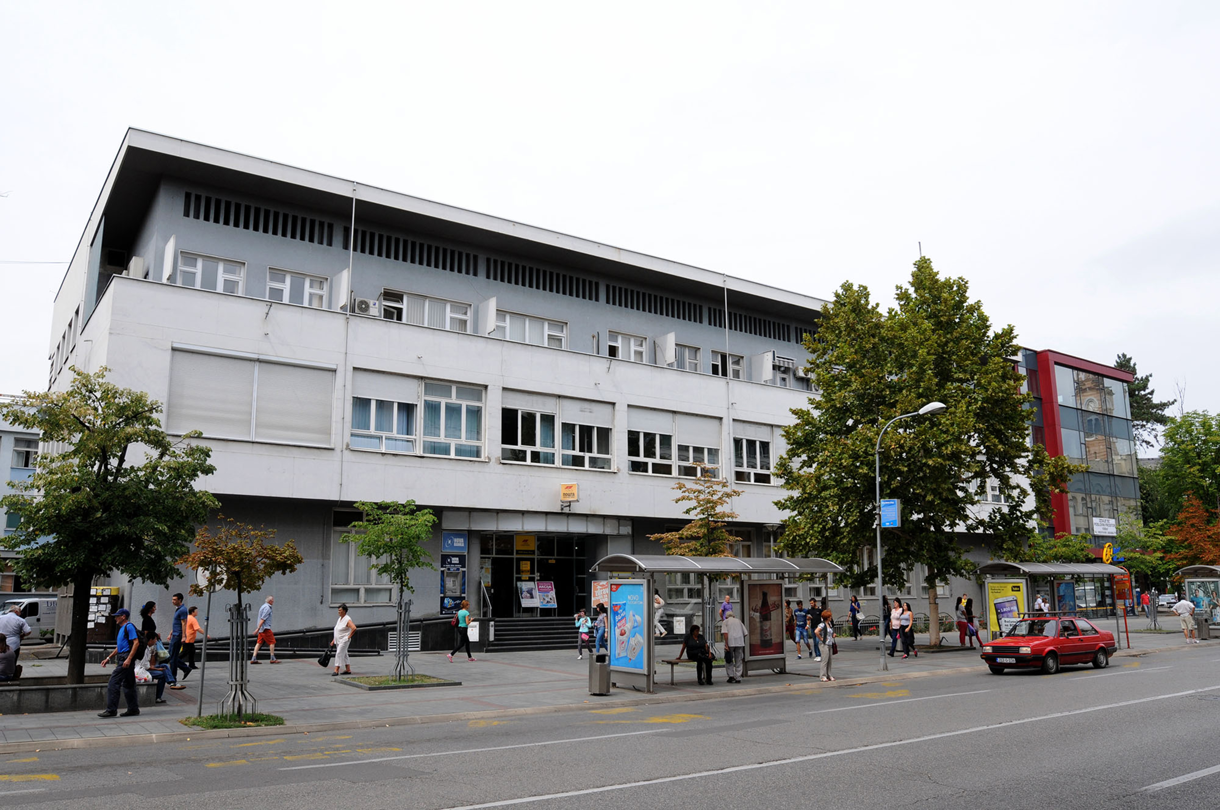 Glavna posta Banja Luka centar. Сликава е подигната во рамките на проектот „По трагата на душата 2015“.